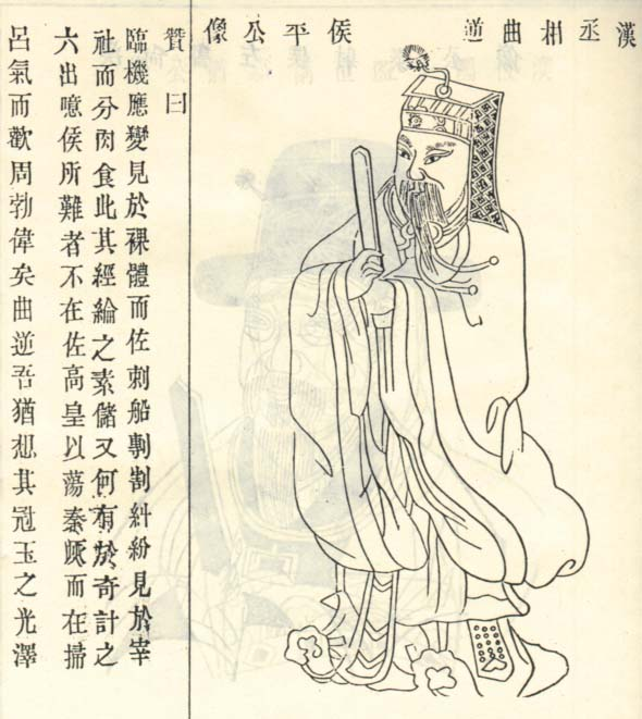 汉丞相陈平像。像取自清代修《江苏南兆陈氏宗谱》。